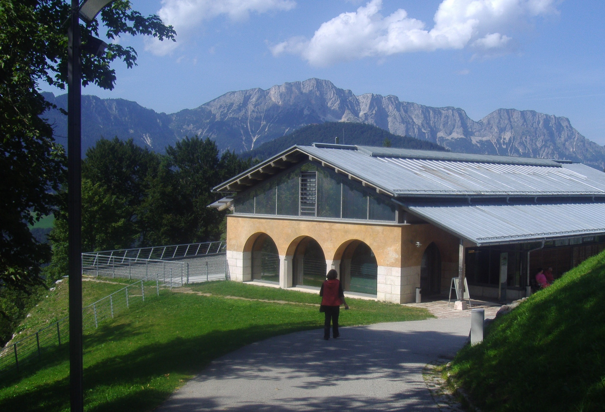 Das im Jahr 1999 eröffnete Dokumentationszentrum Obersalzberg bei Berchtesgaden, Bayern, über die dortige NS-Diktatur; im Hintergrund das Untersberg-Massiv, links der Berchtesgadener Hochthron (1972 m) und rechts der Salzburger Hochthron (1852 m)